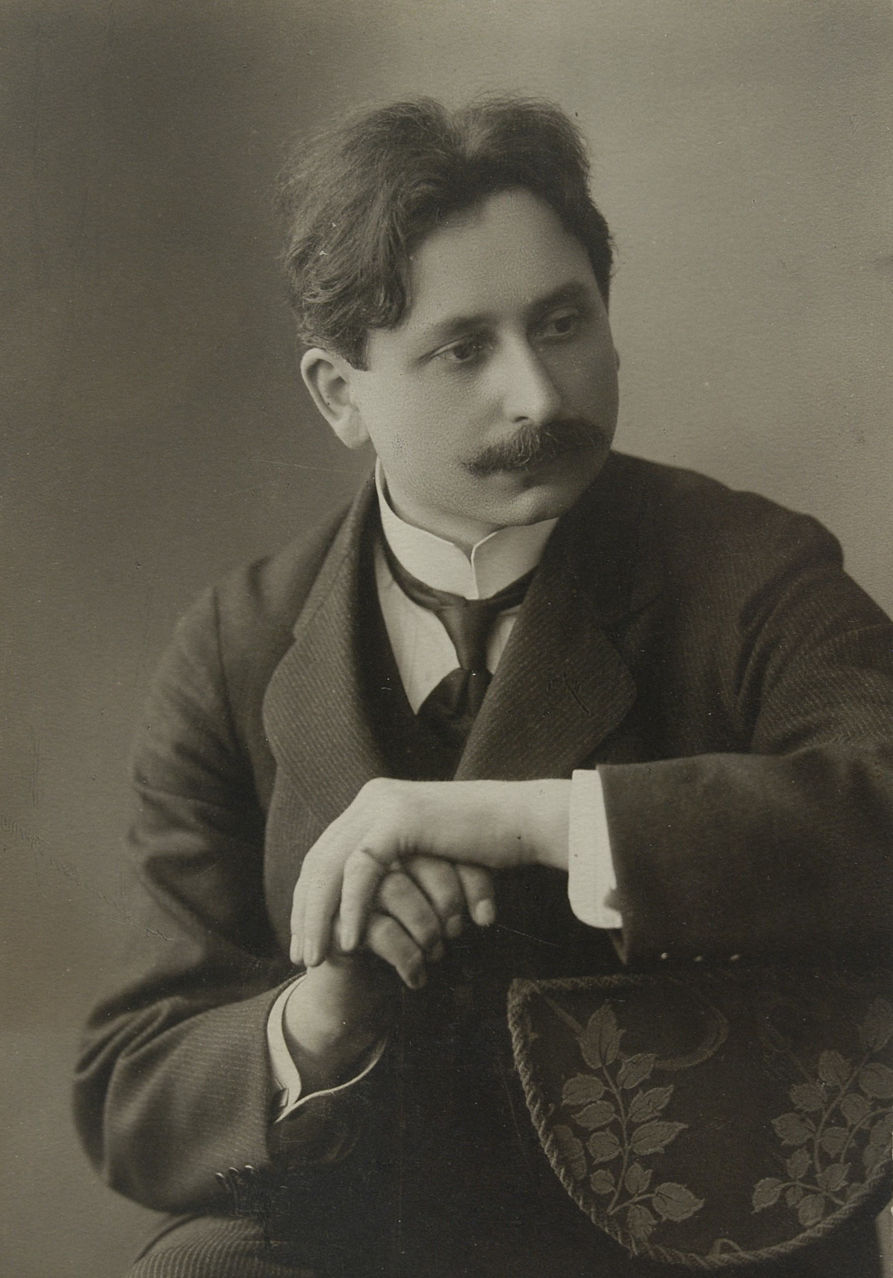 Feliks Nowowiejski, post 1908 r.